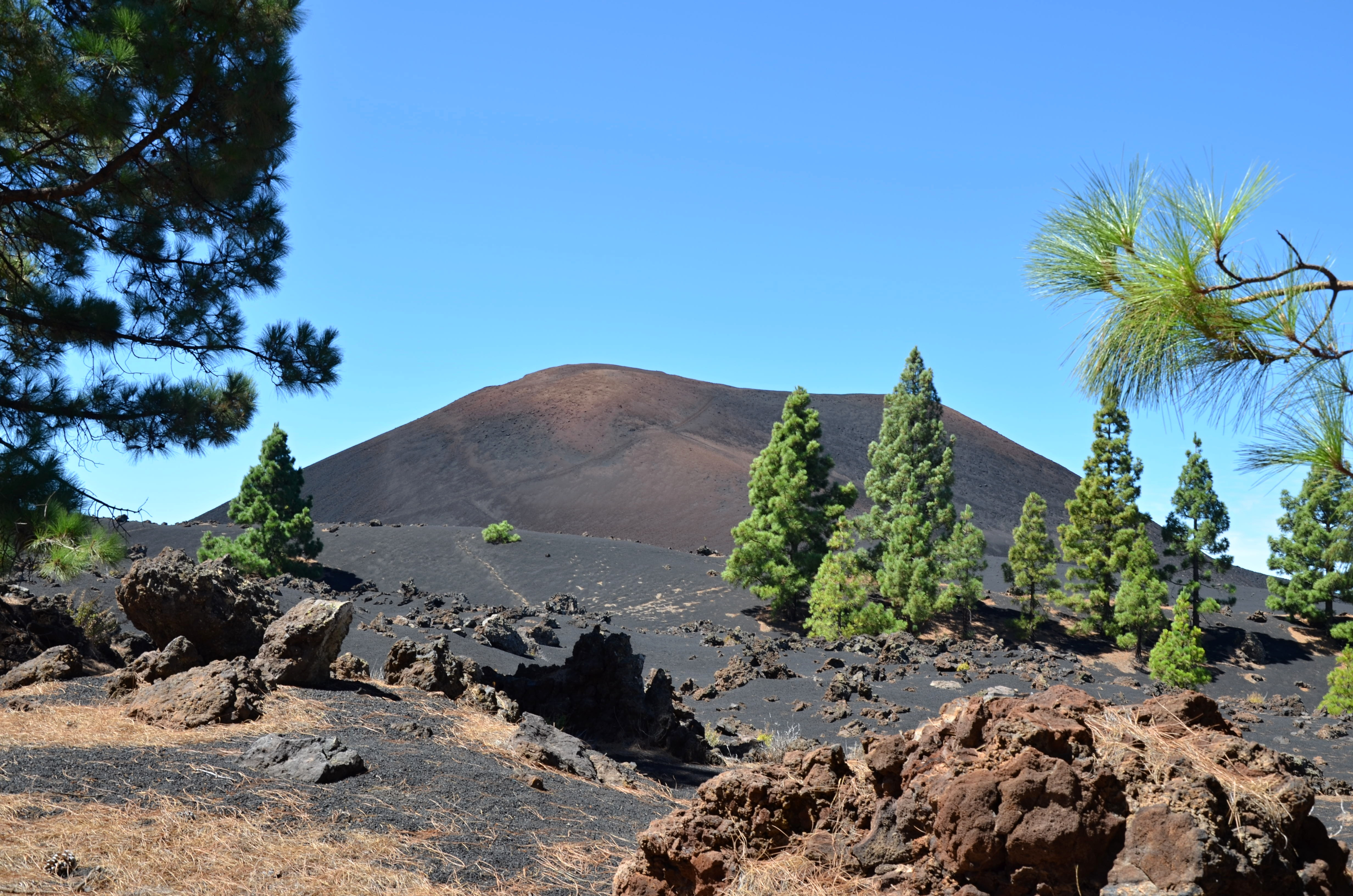 Chinyero - Volcán This is a photography of a Site of Community Importance in Spain with the ID: ES7020052. Natura2000 entry, EEA entry